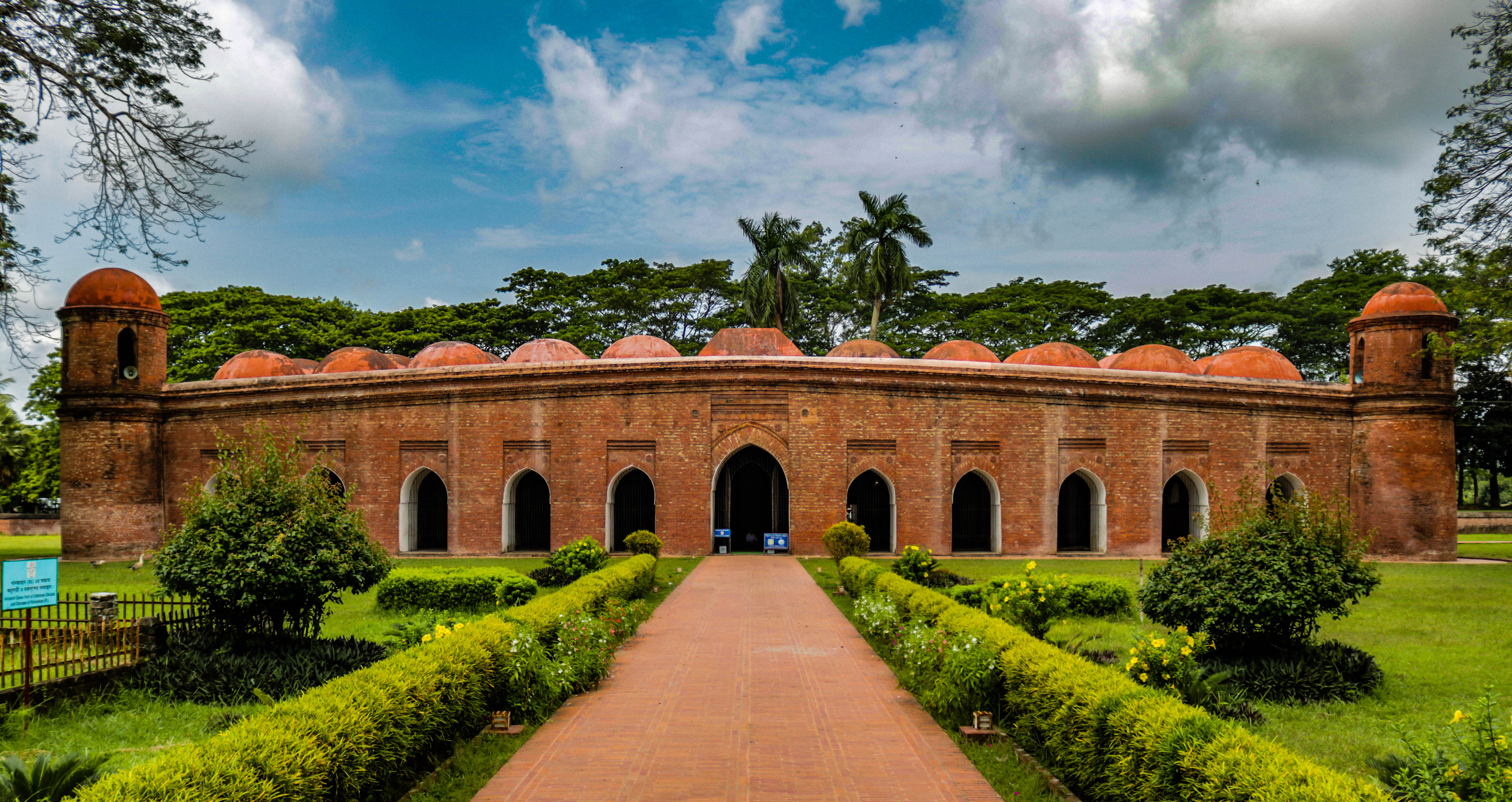 ষাট গম্বুজ মসজিদ